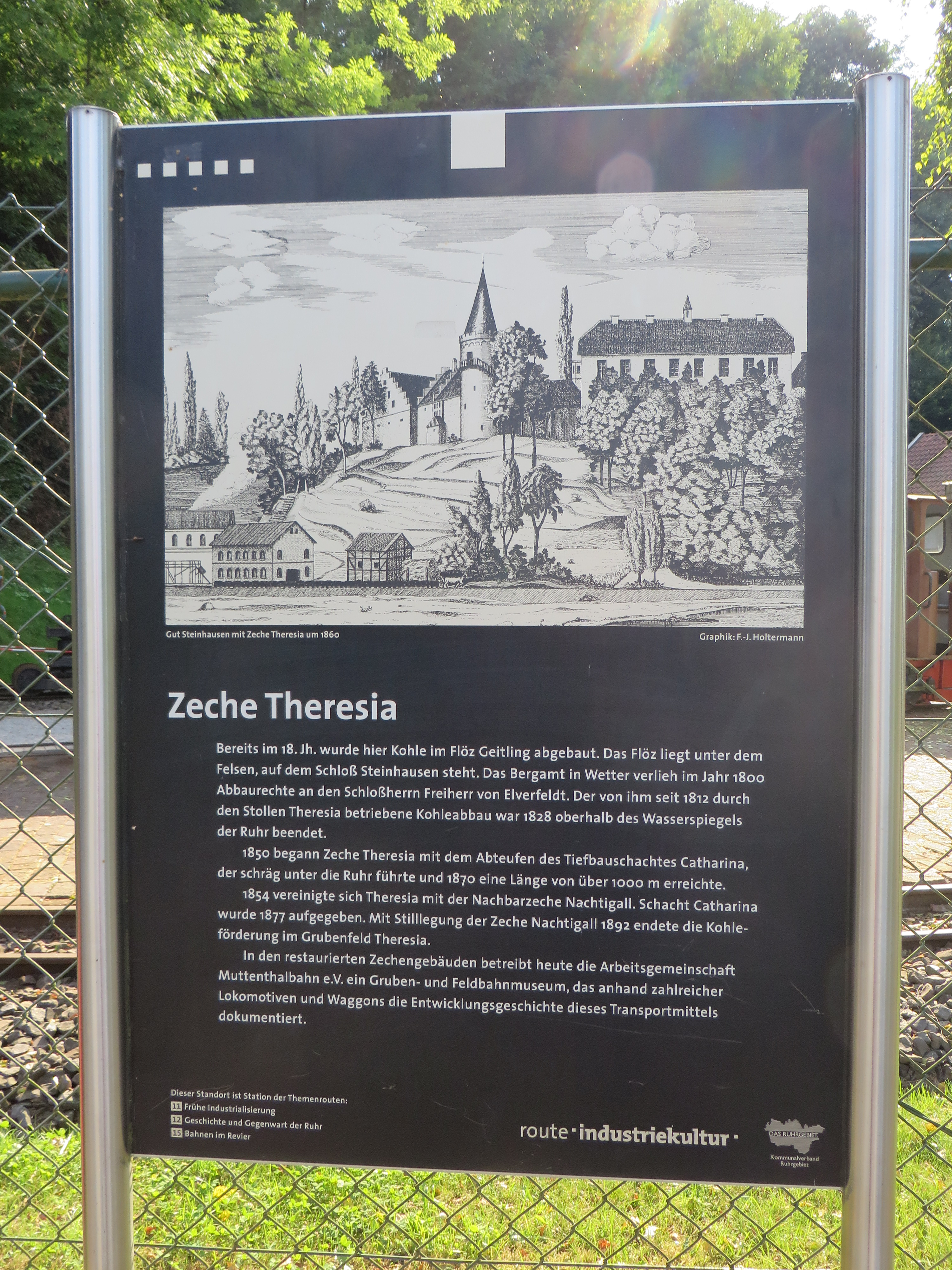 Infotafel zur Zeche Theresia auf der Route der Industriekultur in Witten